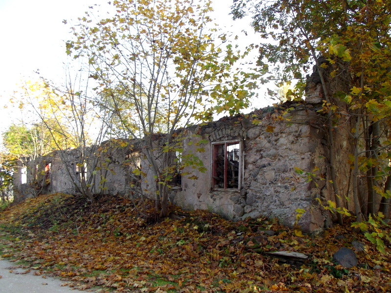 Putnenes muiža